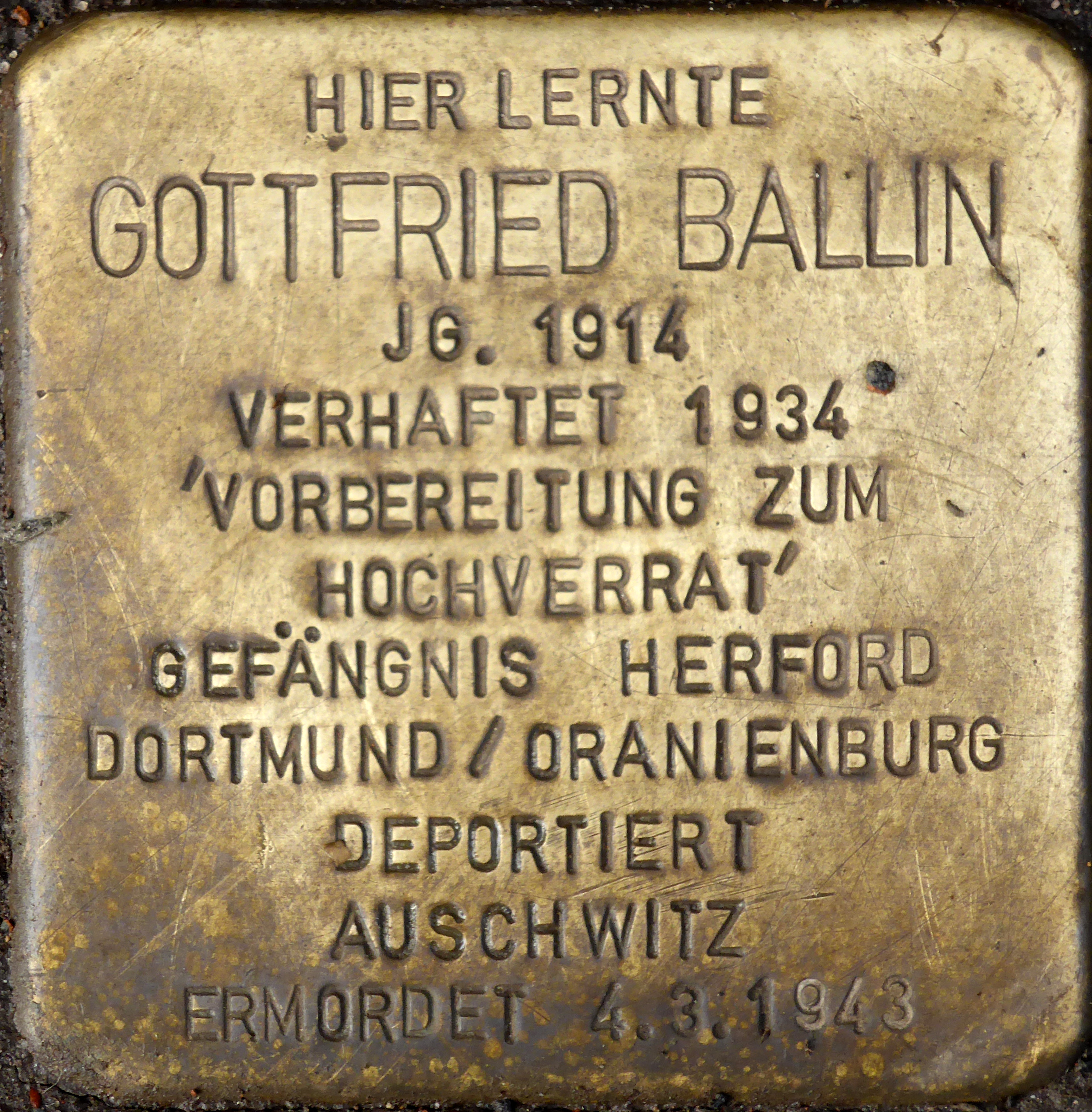 Stolperstein: Gottfried Ballin, Vogelsanger Straße 1, Köln